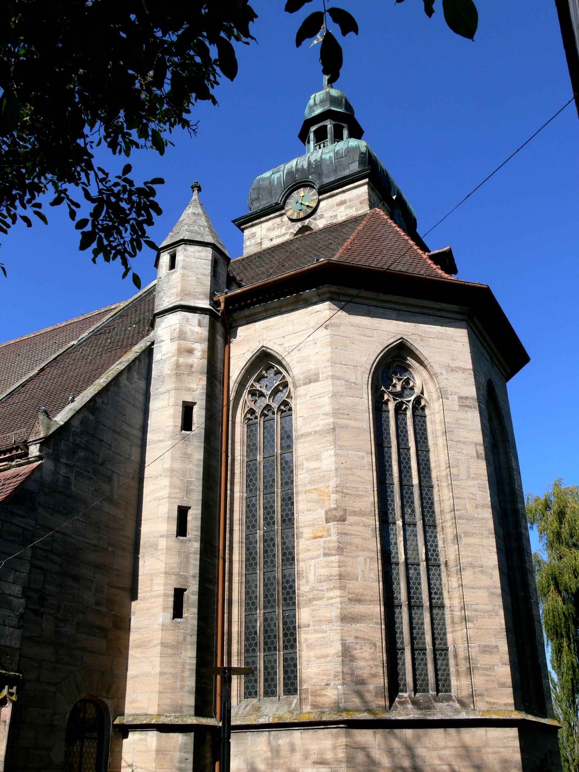 Pfarrkirche St.Kilian in Markt Erlbach. Gotische Apsis ( 14.Jhdt. )